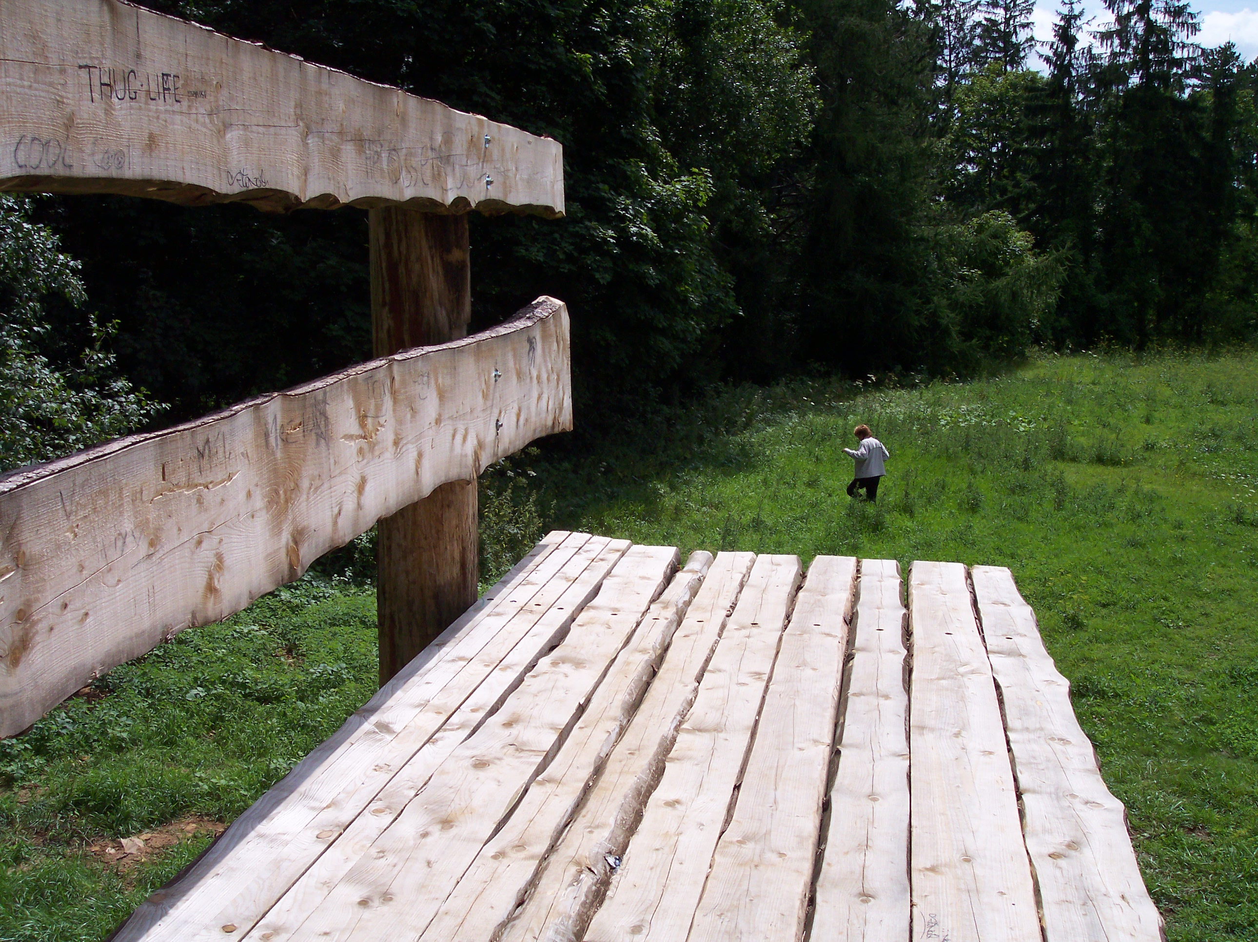 Gaalgebierg bij Esch sur Alzette in Luxemburg. Foto: Henri van Zeeland